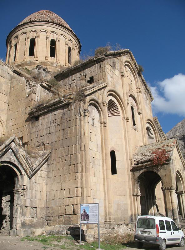 Restanten van een Georgische kerk in �?kvank (Georgisch: Oshki), gebouwd aan het einde van de 10e eeuw. Het dak is ingestort, maar de muren staan nog overeind.